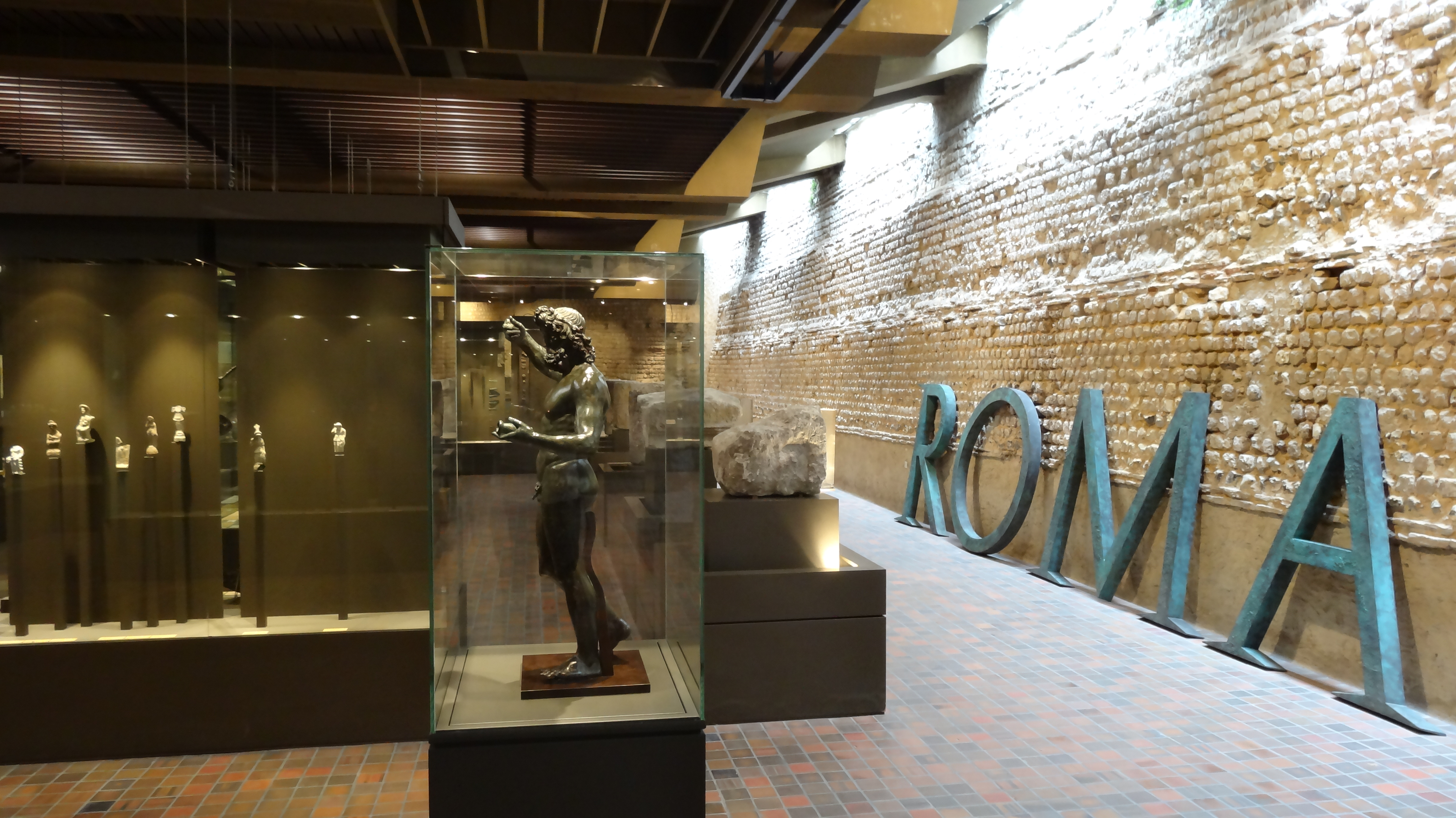 La salle archéologique du musée d'Évreux (Normandie) - Assises véritables des remparts gallo-romains sur la droite.